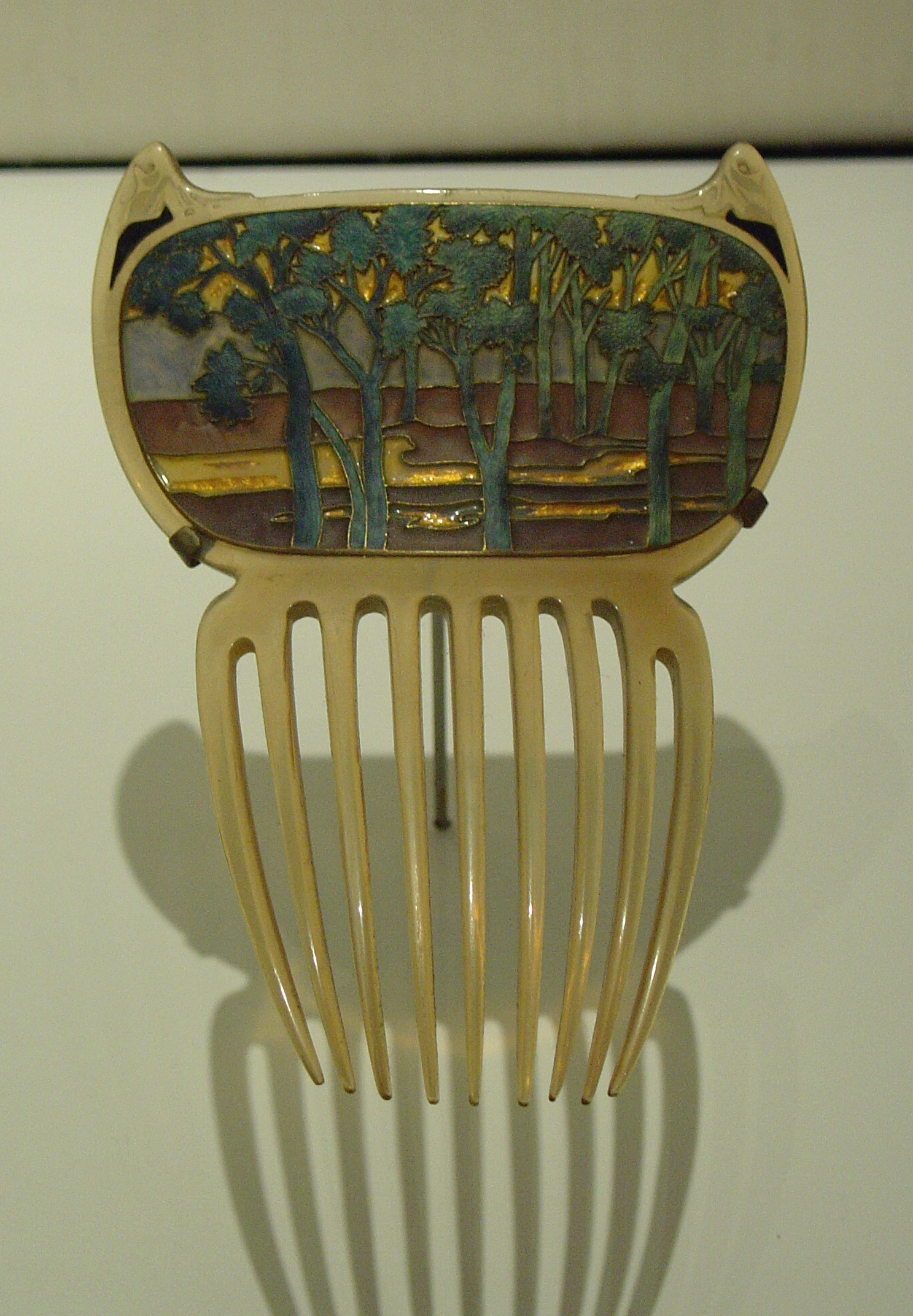 Bijou Renée Lalique. Musée Calouste Gulbenkian, Lisbonne (Portugal)